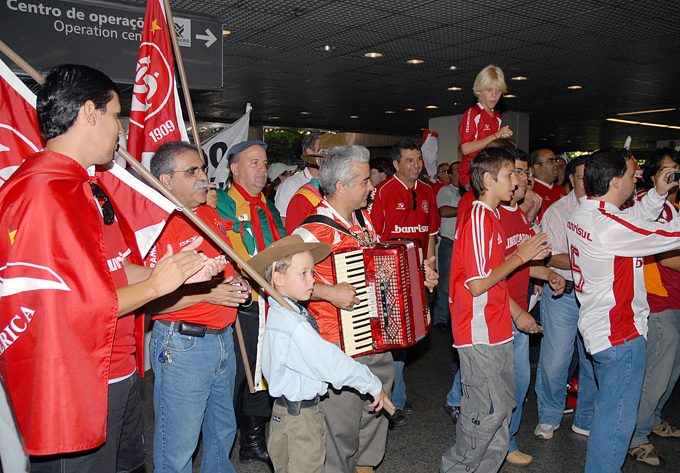 Torcedores Colorados no aeroporto esperando os campeões mundiais